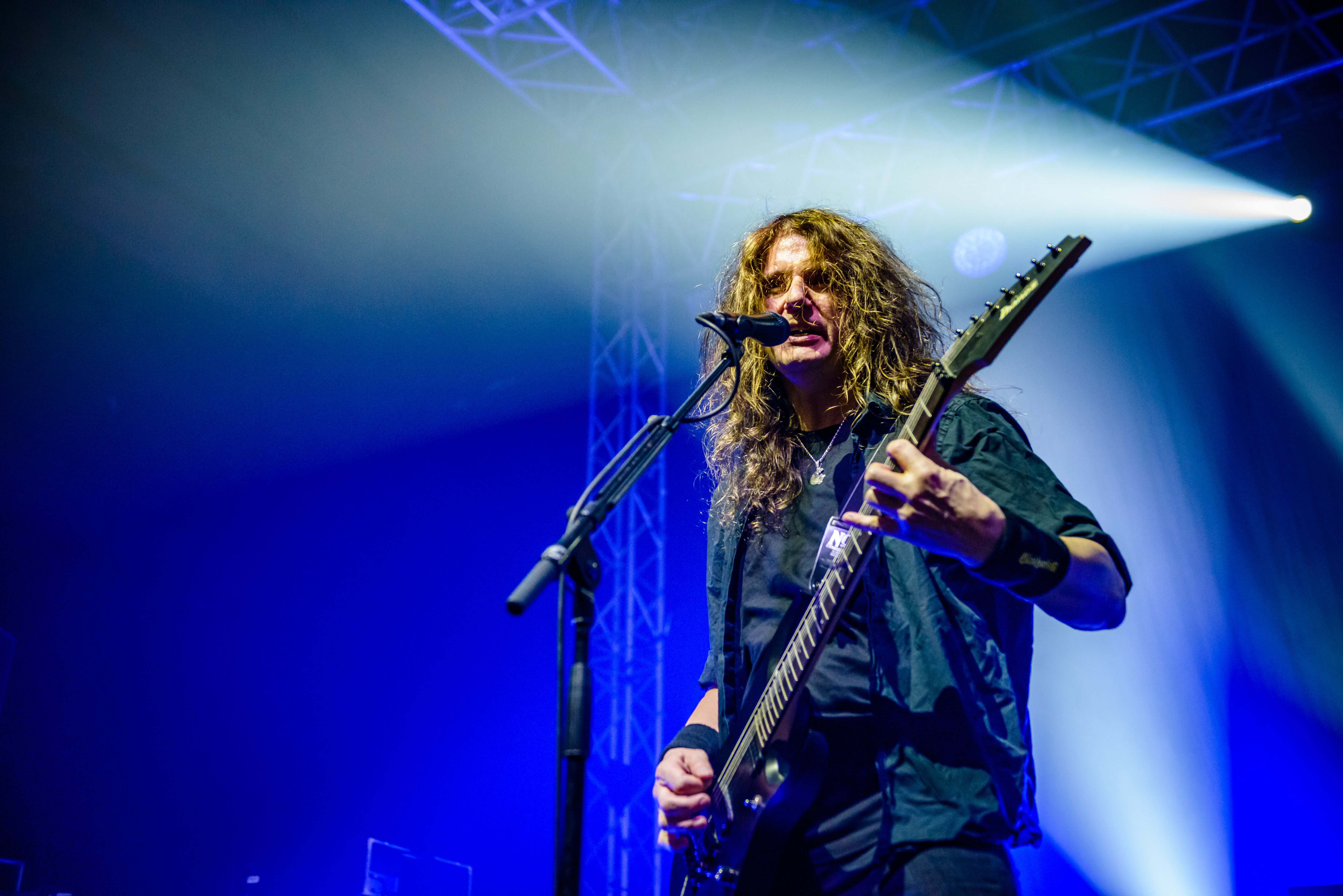 'Ruhrpott Metal Meeting 2016; Oberhausen Turbinenhalle': 'Blind Guardian'